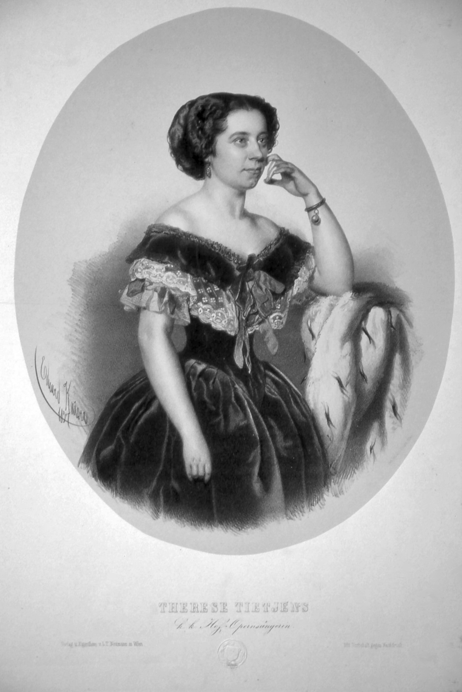 Therese Titjens (1831-1877). deutsche Opernsängerin. Lithographie von Eduard Kaiser, 1657